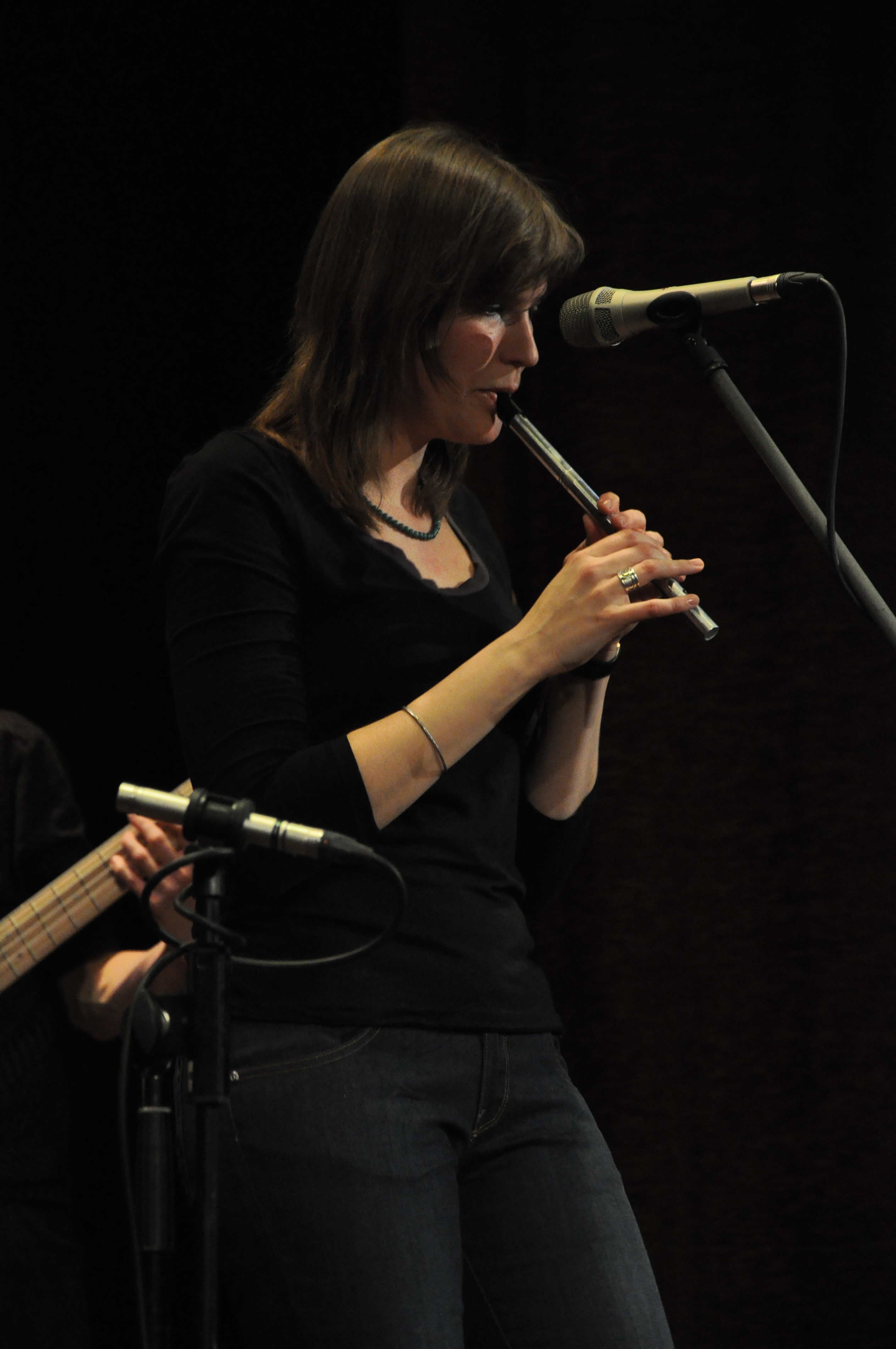 Kateřina García na dvojkoncertě skupin Garcia a Druhá tráva v Hradci Králové